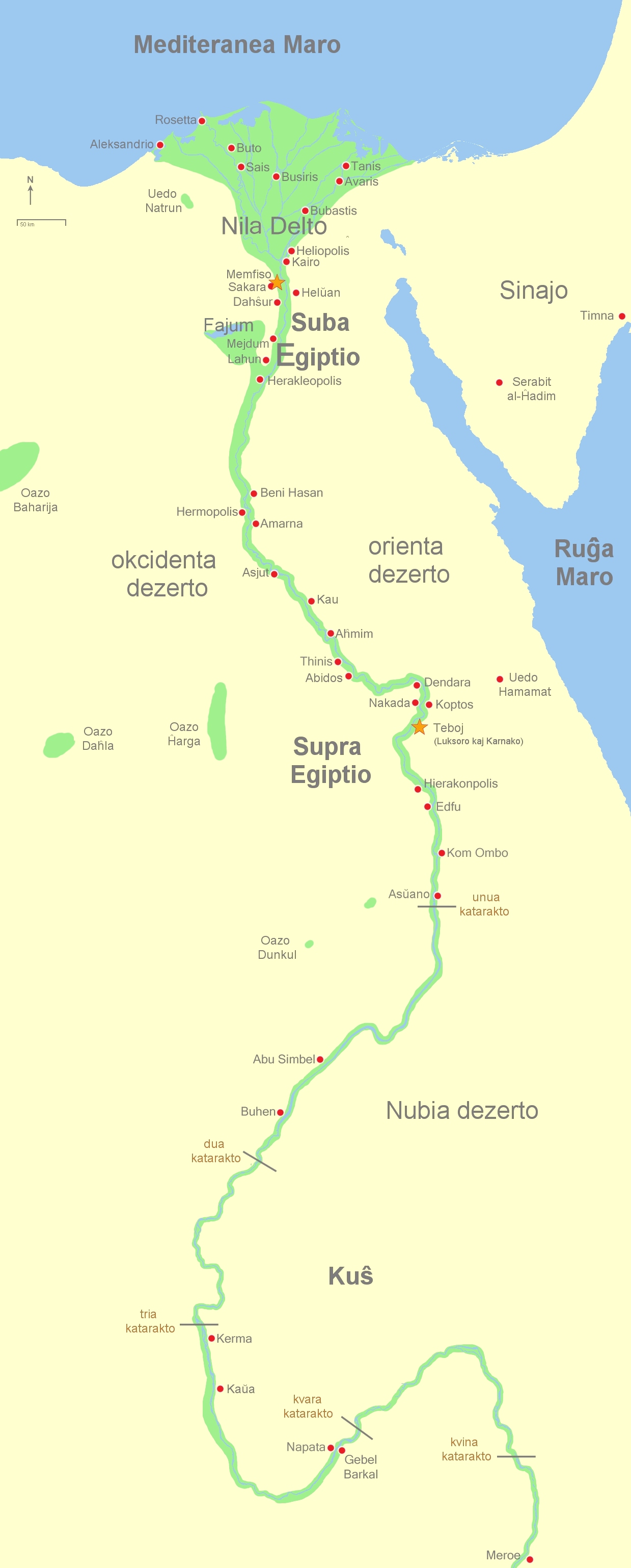 Mapo de antikva Egiptio, priskribo en Esperanto